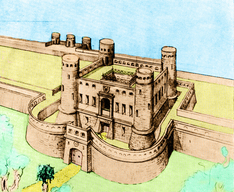 Ricostruzione del Castello costruito da Domenico Doria ad Oneglia, Imperia, Italy